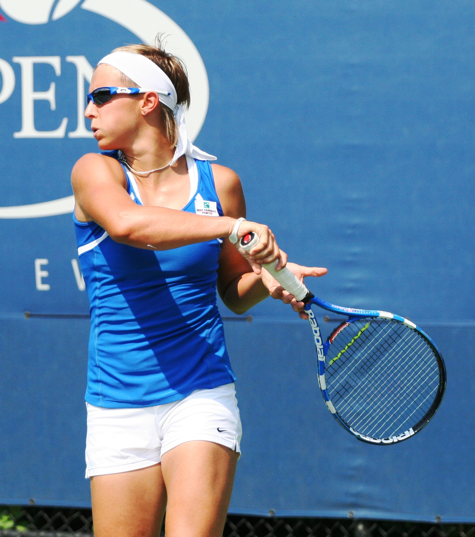 U.S. Open Wednesday, Sept. 1, 2010